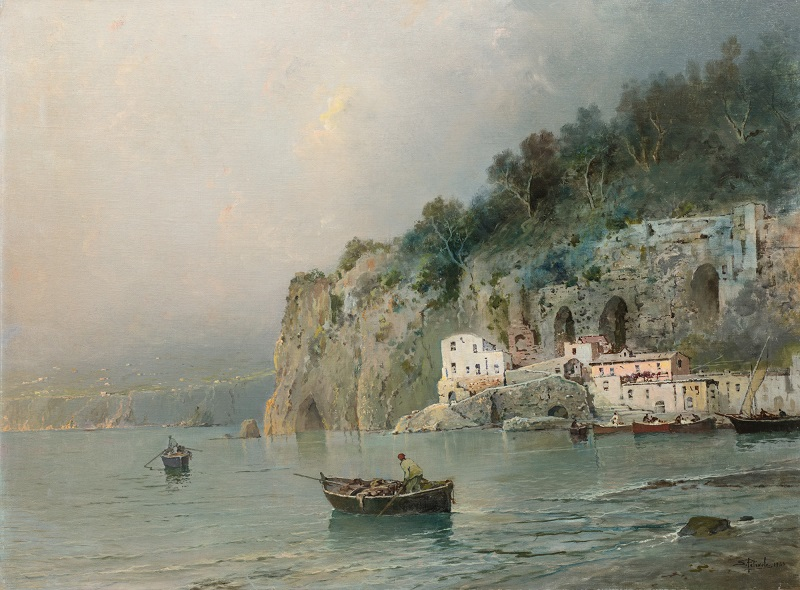 Costiera amalfitana, olio su tela, cm 65 x 90, firmato, coll. privata